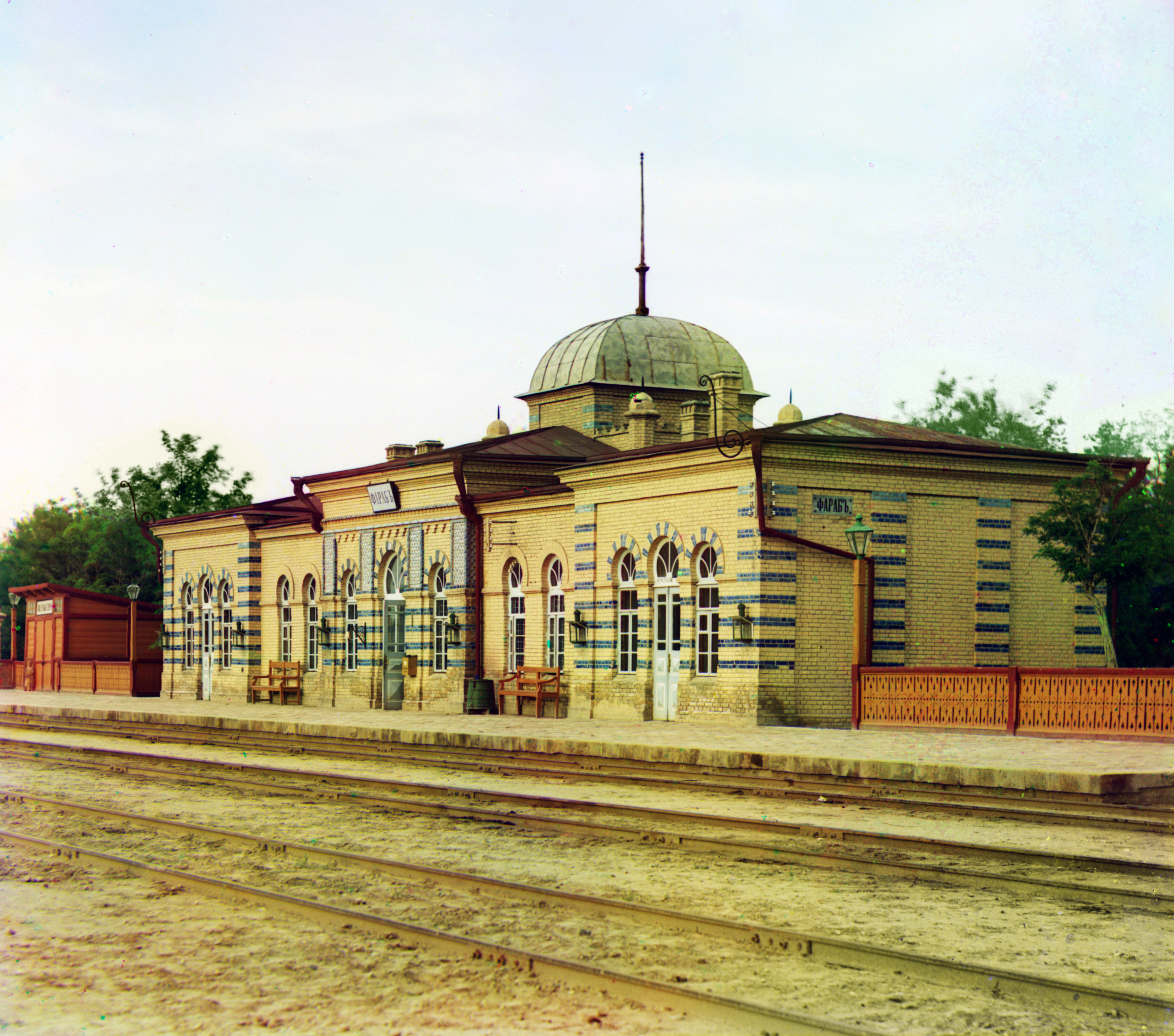 Ст. Фараб в 5 в. от Чарджуя (Туркмения)